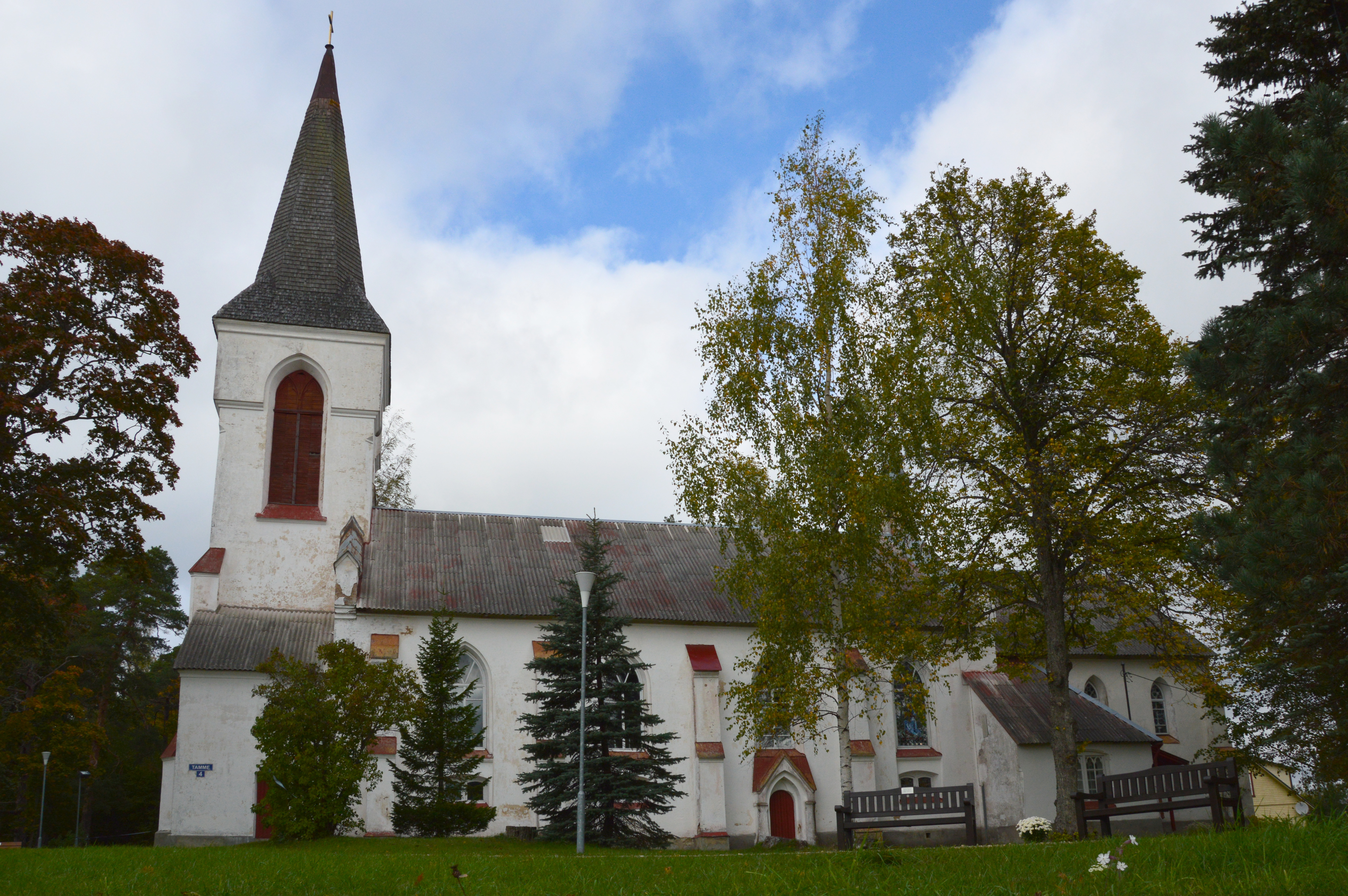 Iisaku kirik